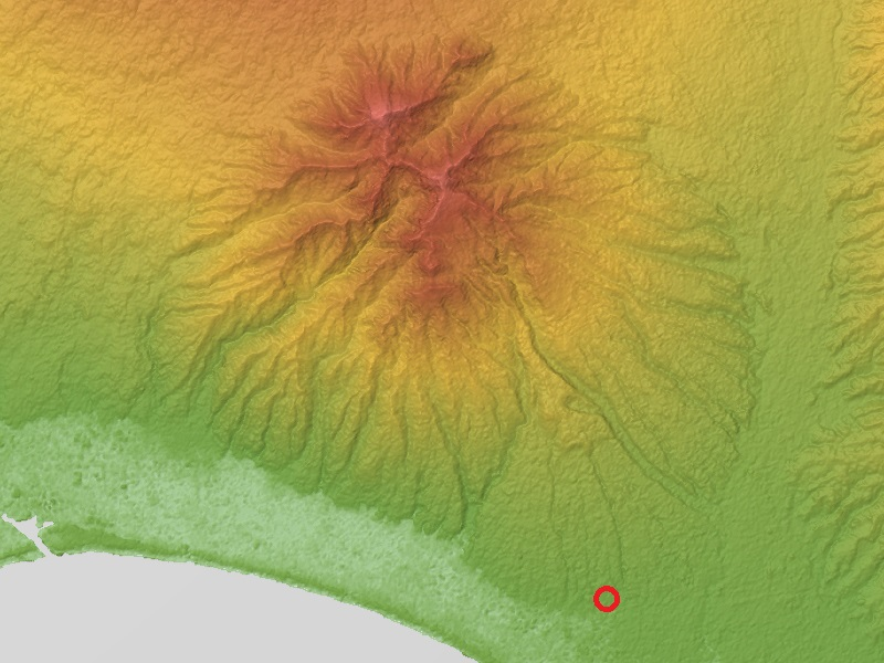 高尾山古墳の位置も付け加えた、愛鷹山とその周辺の地図。